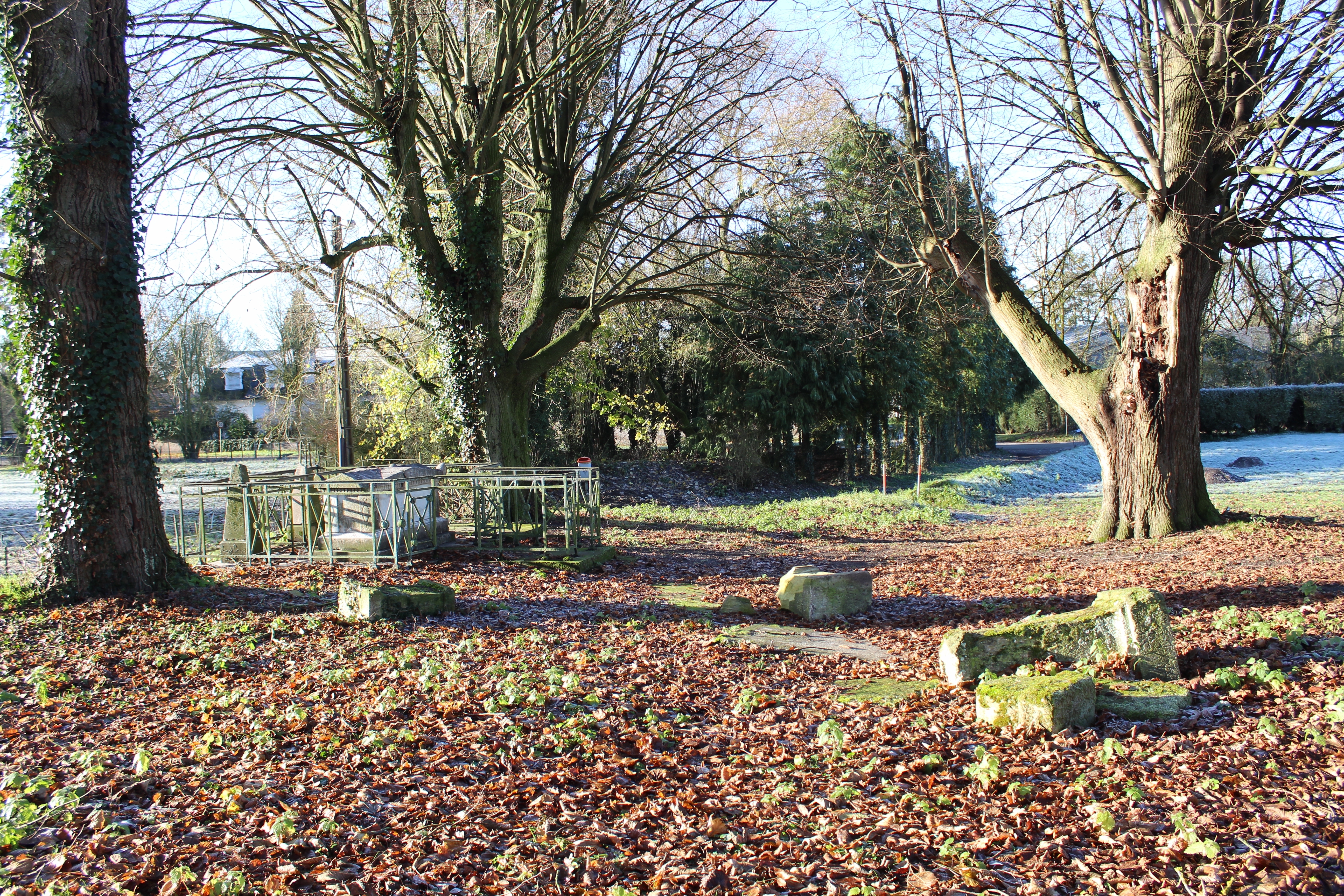 Vestiges de l'ancien cimetière.